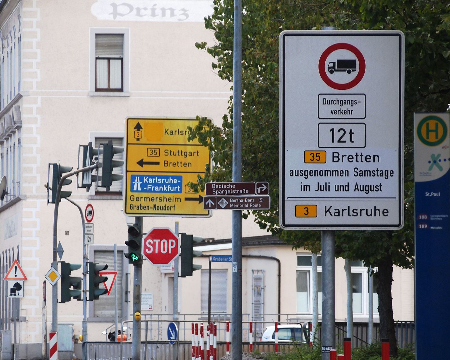 Verkehrszeichen an der Kreuzung der B3 mit der B35 in Bruchsal Verbot für Durchgangsschwerverkehr, außer an Samstagen im Juli und August